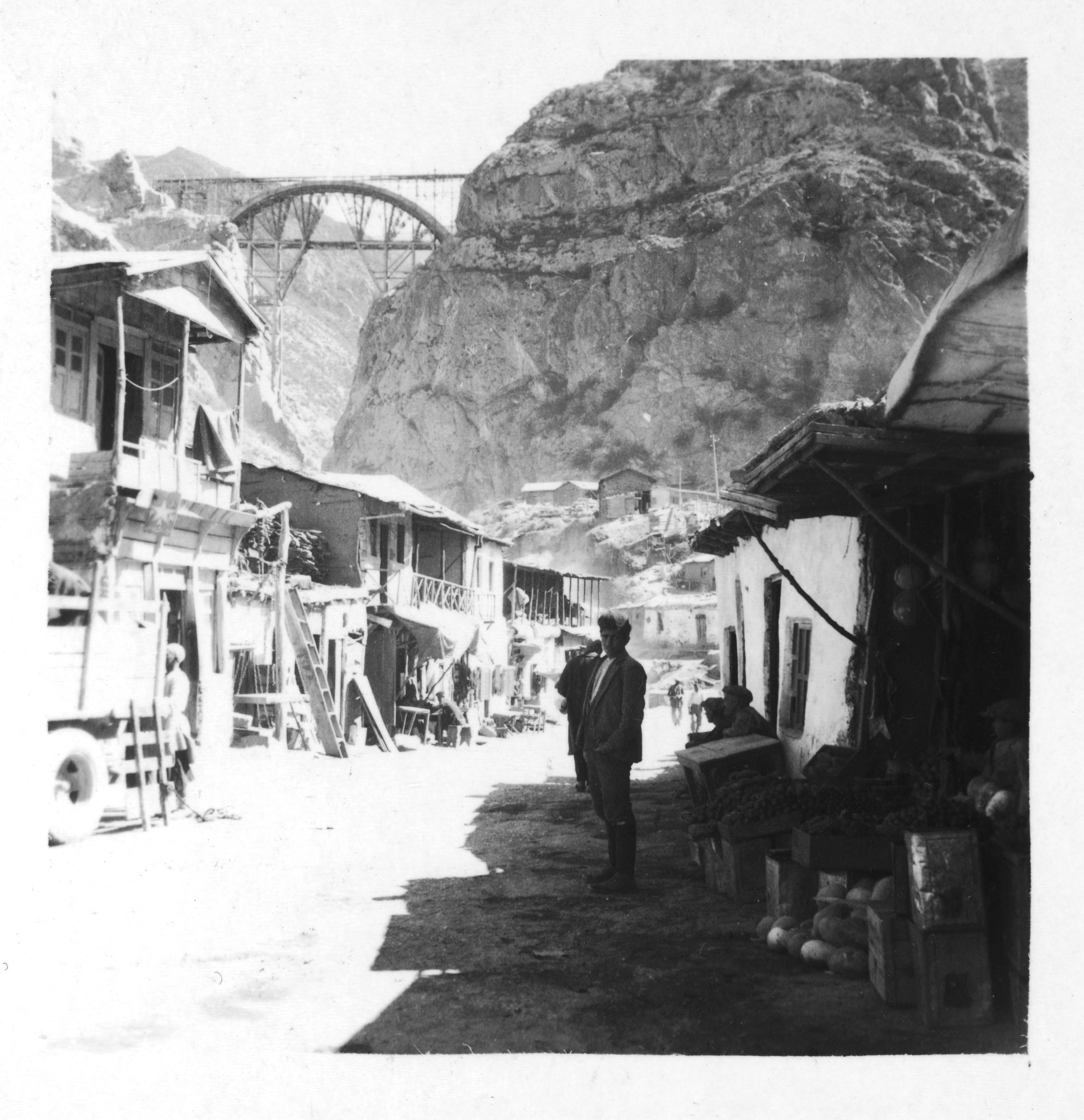 Persien, Firuskuh (Firuzkuh) im Elburs-Gebirge (Elburz): Siedlung; Bauarbeiter-Baracken, im Hintergrund eine Eisenbahnbrücke